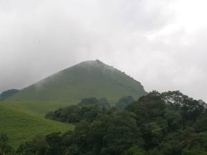 Iruppu upper reaches. Brahmagiris, Coorg, Karnataka Nov 2005